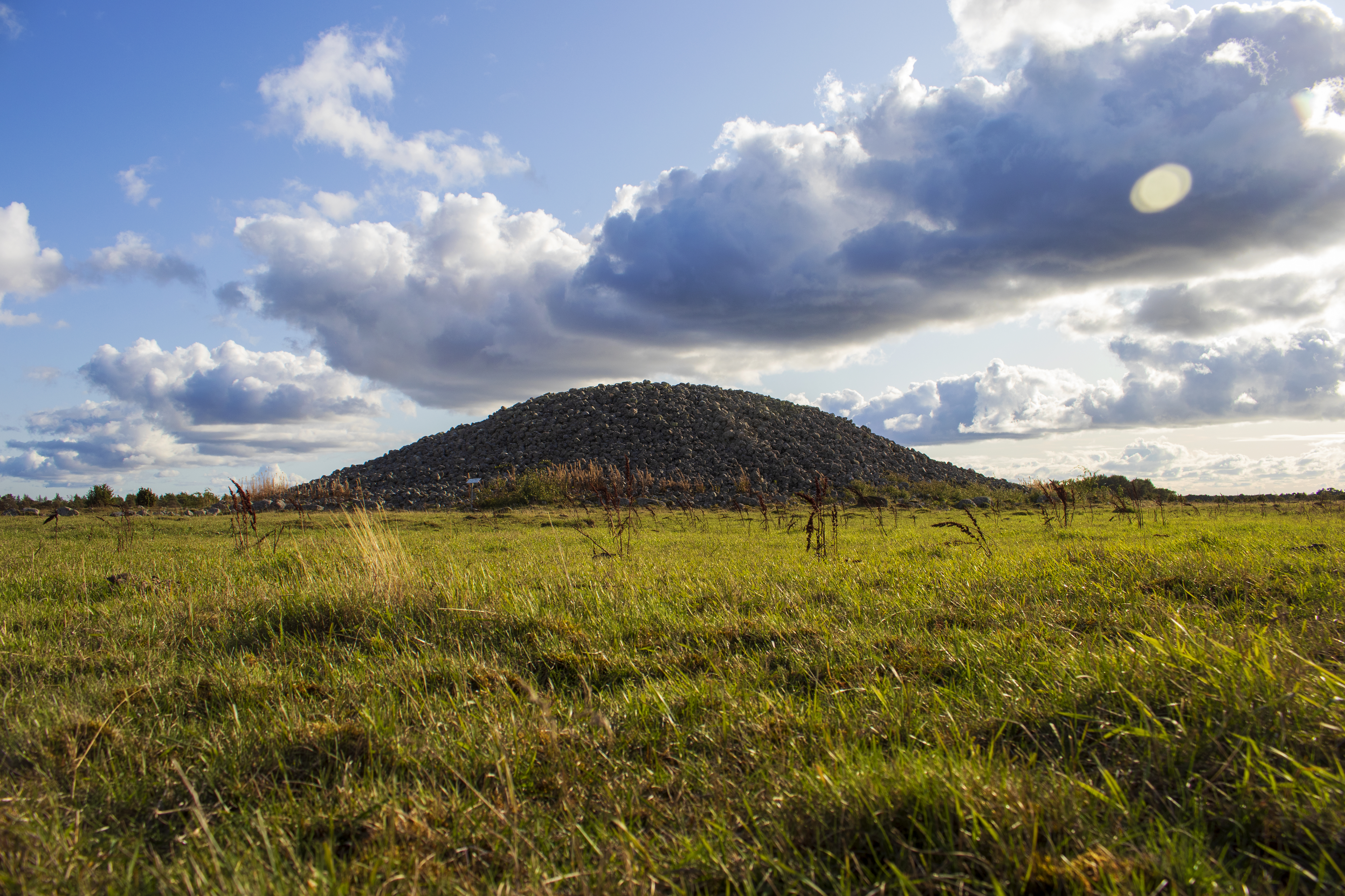 Uggarde rojr, Rone, Gotland.